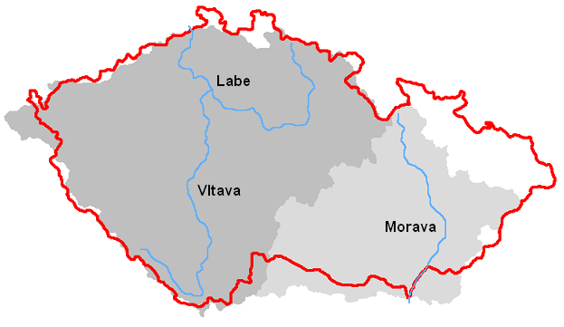 Mapa dvou českých povodí